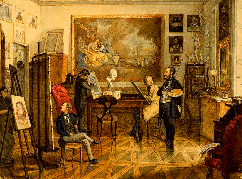 Barabás Miklós műtermében, vízfestmény, papír, 12,9 x 17,3 cm Magyar Nemzeti Galéria, Budapest